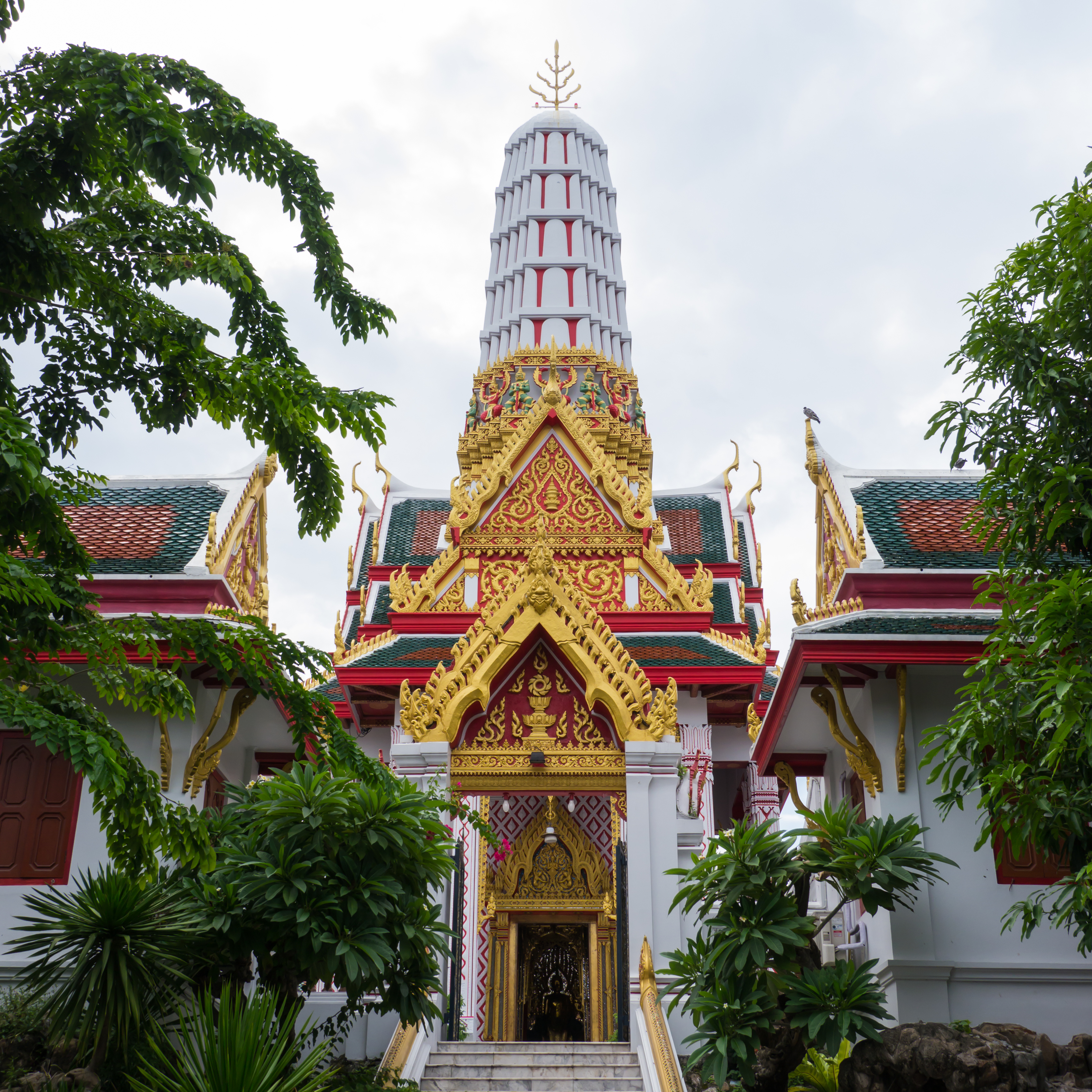 วัดจักรวรรดิราชาวาส (สามปลื้ม)